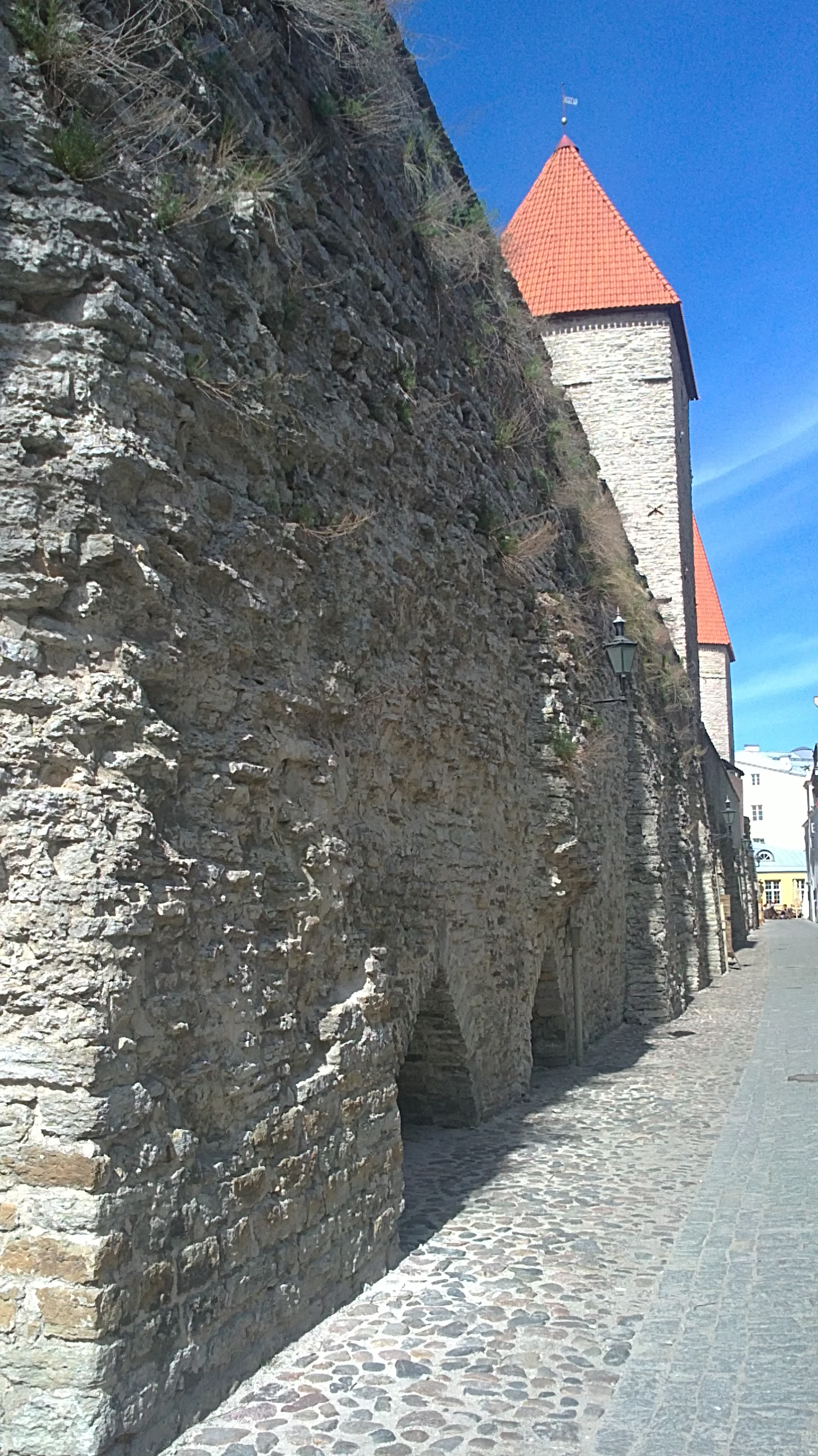 Tallinna linnamüür Laboratooriumi tänaval